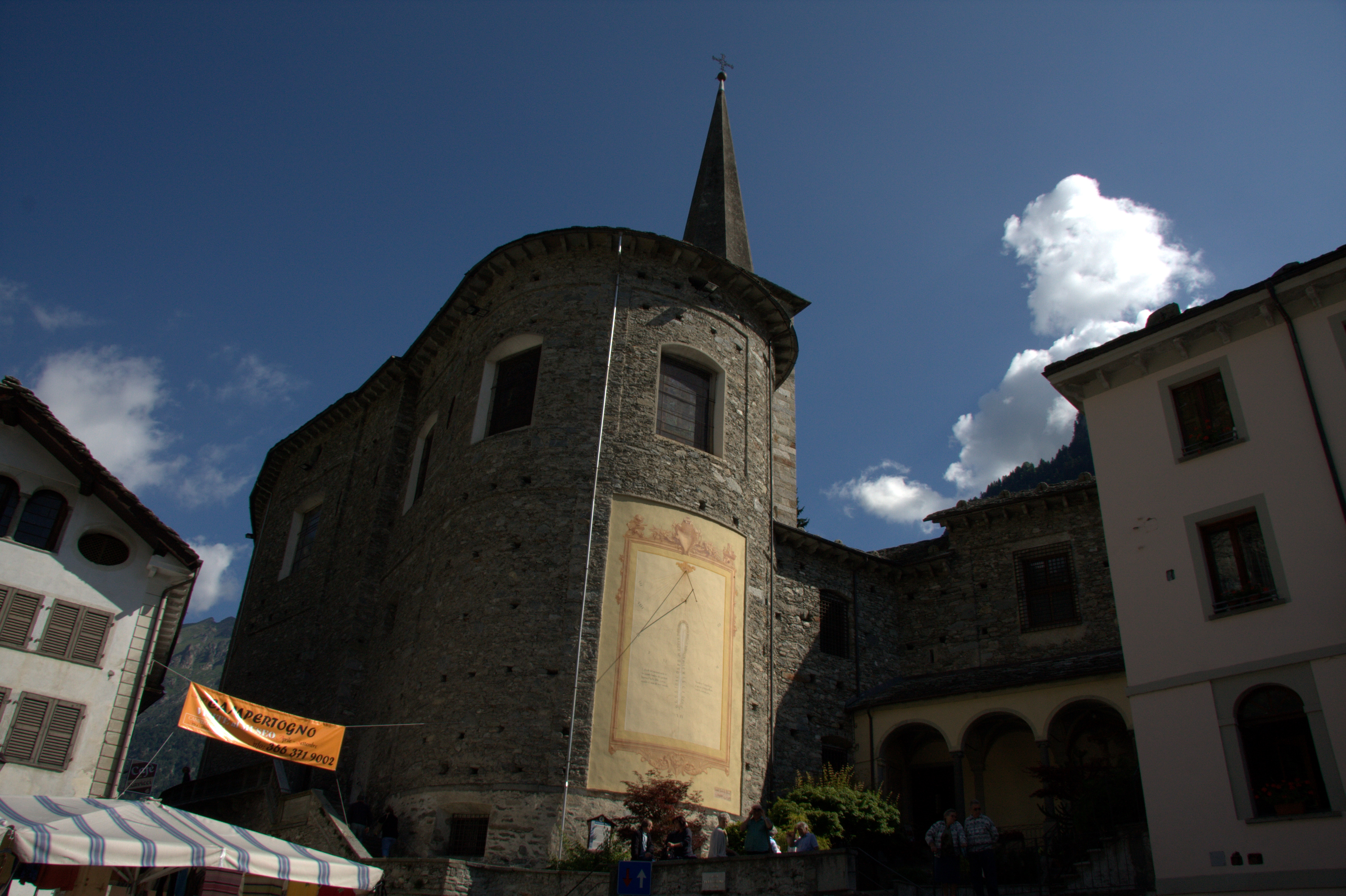 Campertogno